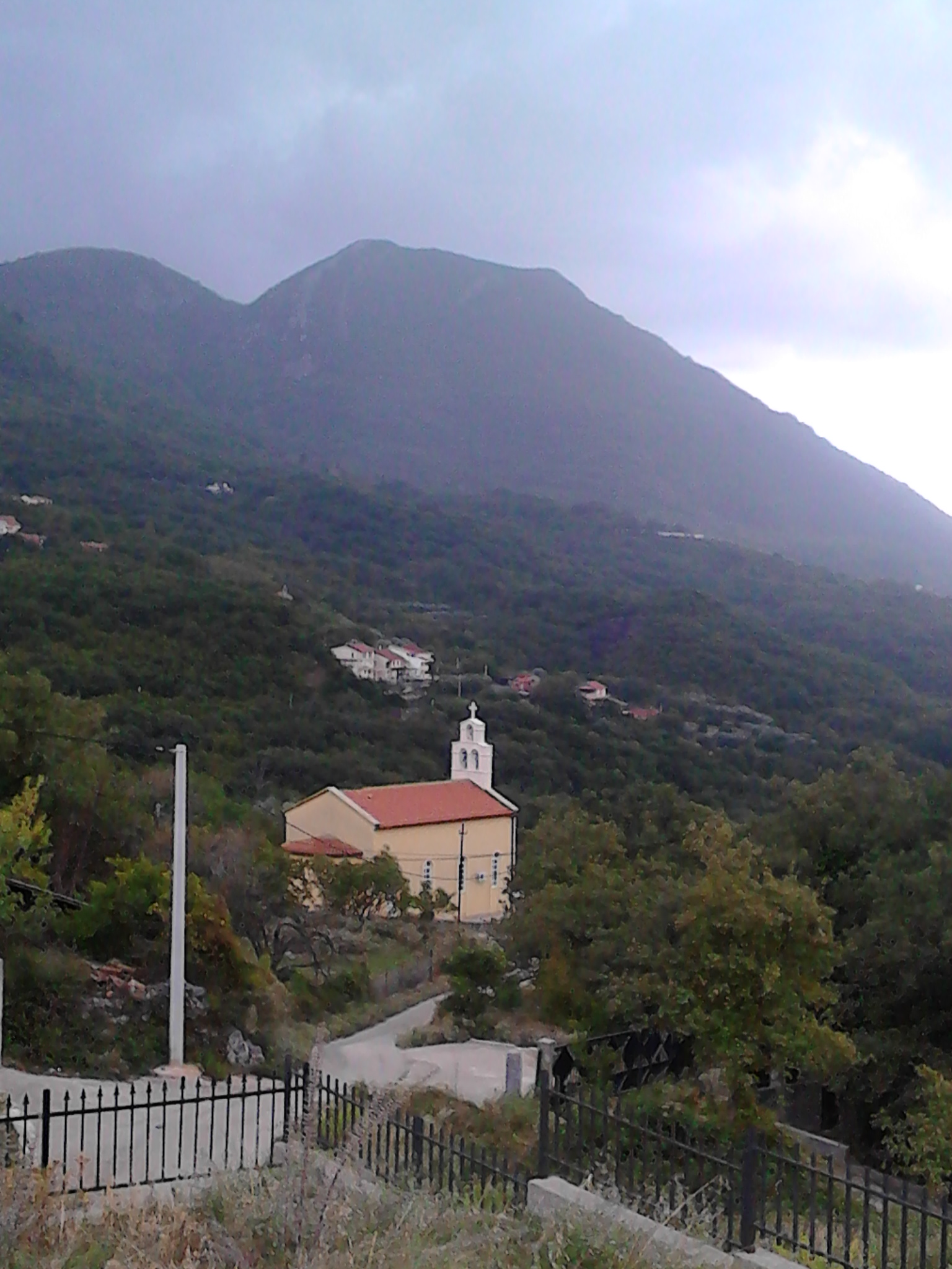 Црква у Зупцима